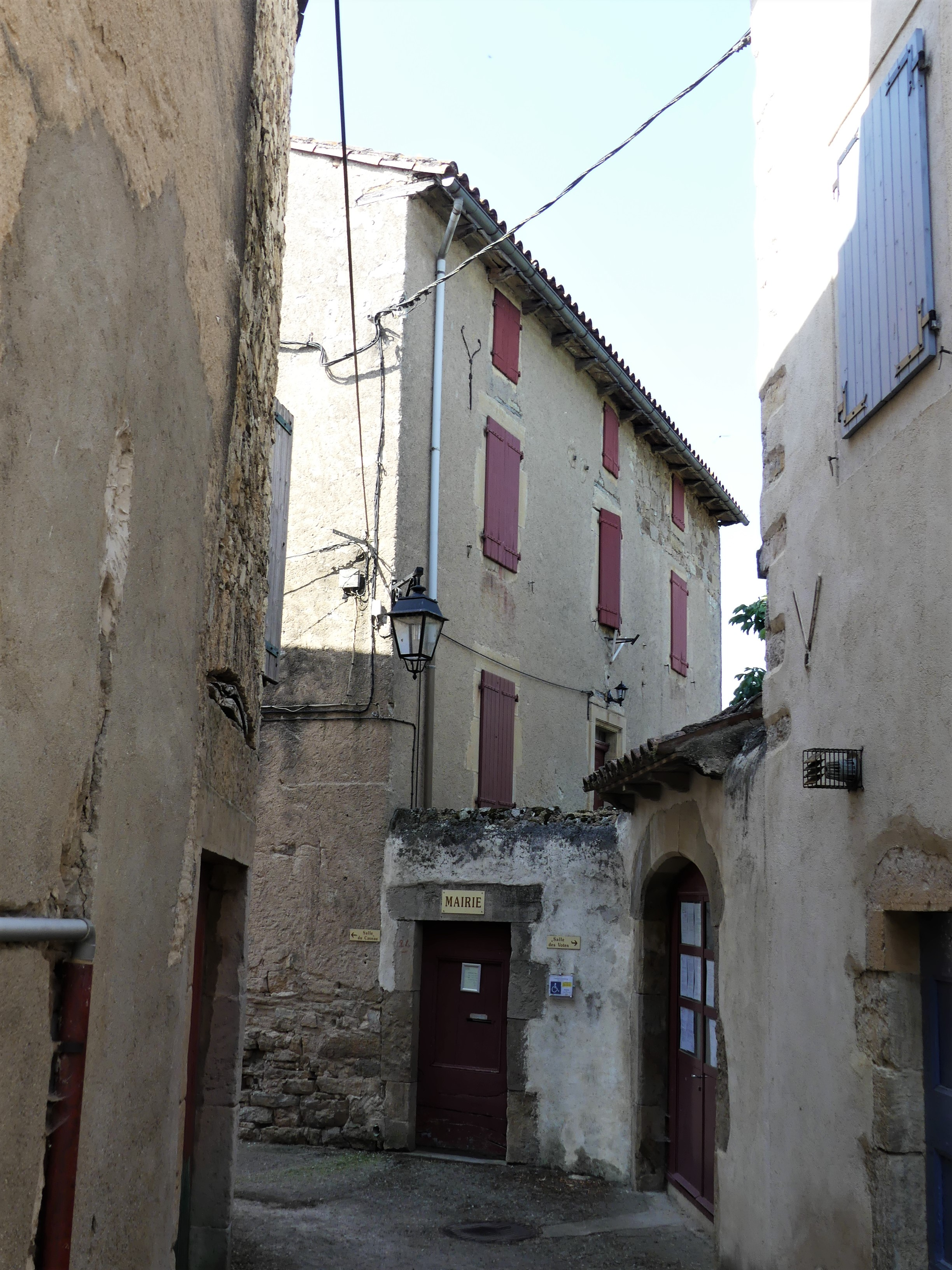 La mairie de Comprégnac, Aveyron, France.